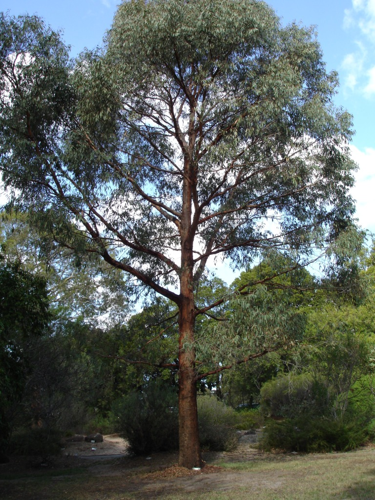 Eucalyptus radiata